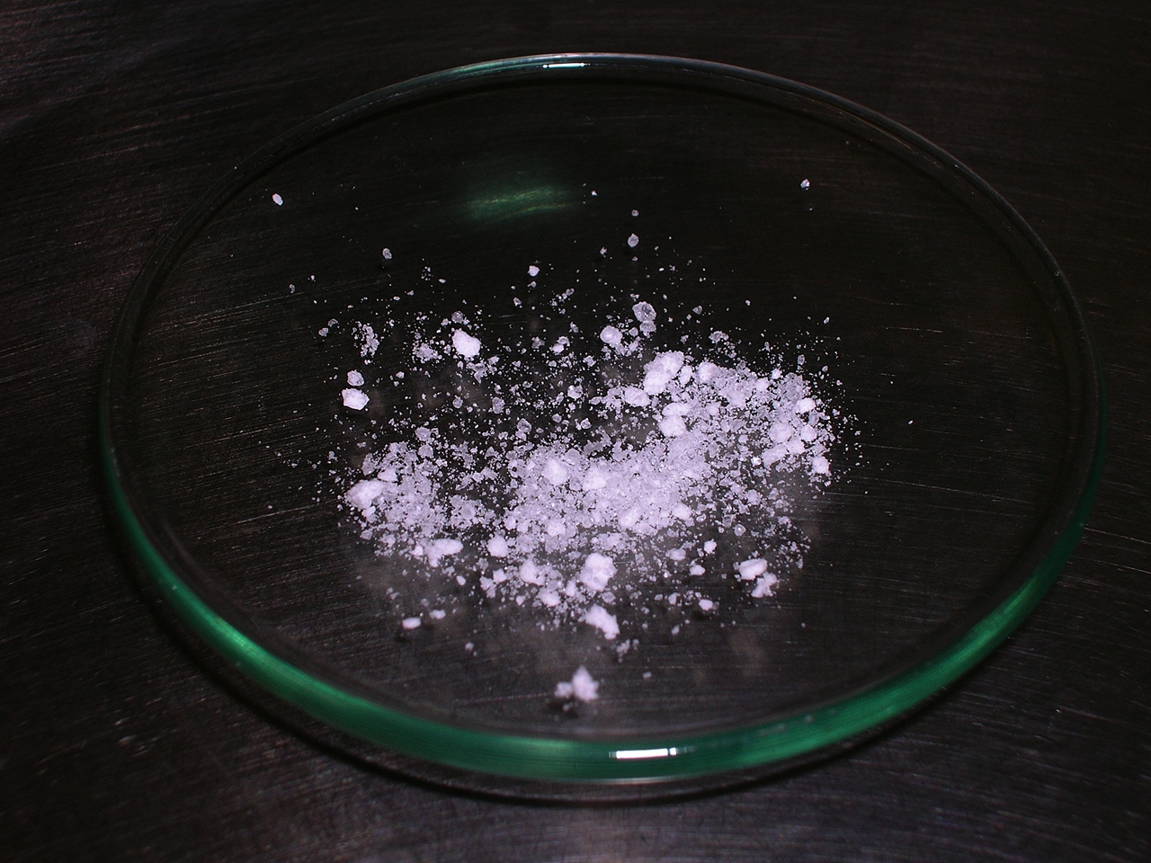 Thymolum